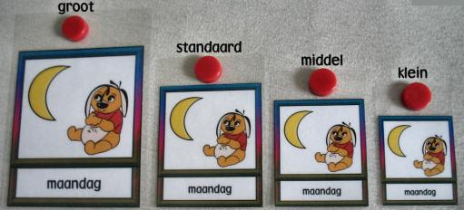 Dagritmekaarten ook wel pictogrammen of picto's genoemd. Deze worden gebruikt als begleiding en hulpmiddel voor kinderen en volwassenen met gedrag, leer en ontwikkelingsstoornissen, zoals: ADHD, PDD-nos, en verdere aan autisme verwante stoornissen. Dagritmekaarten geven structuur en een beter overzicht voor een dagindeling.